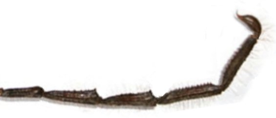 Hadogenes paucidens Pocock, 1896, Scorpiones, Hemiscorpiidae.